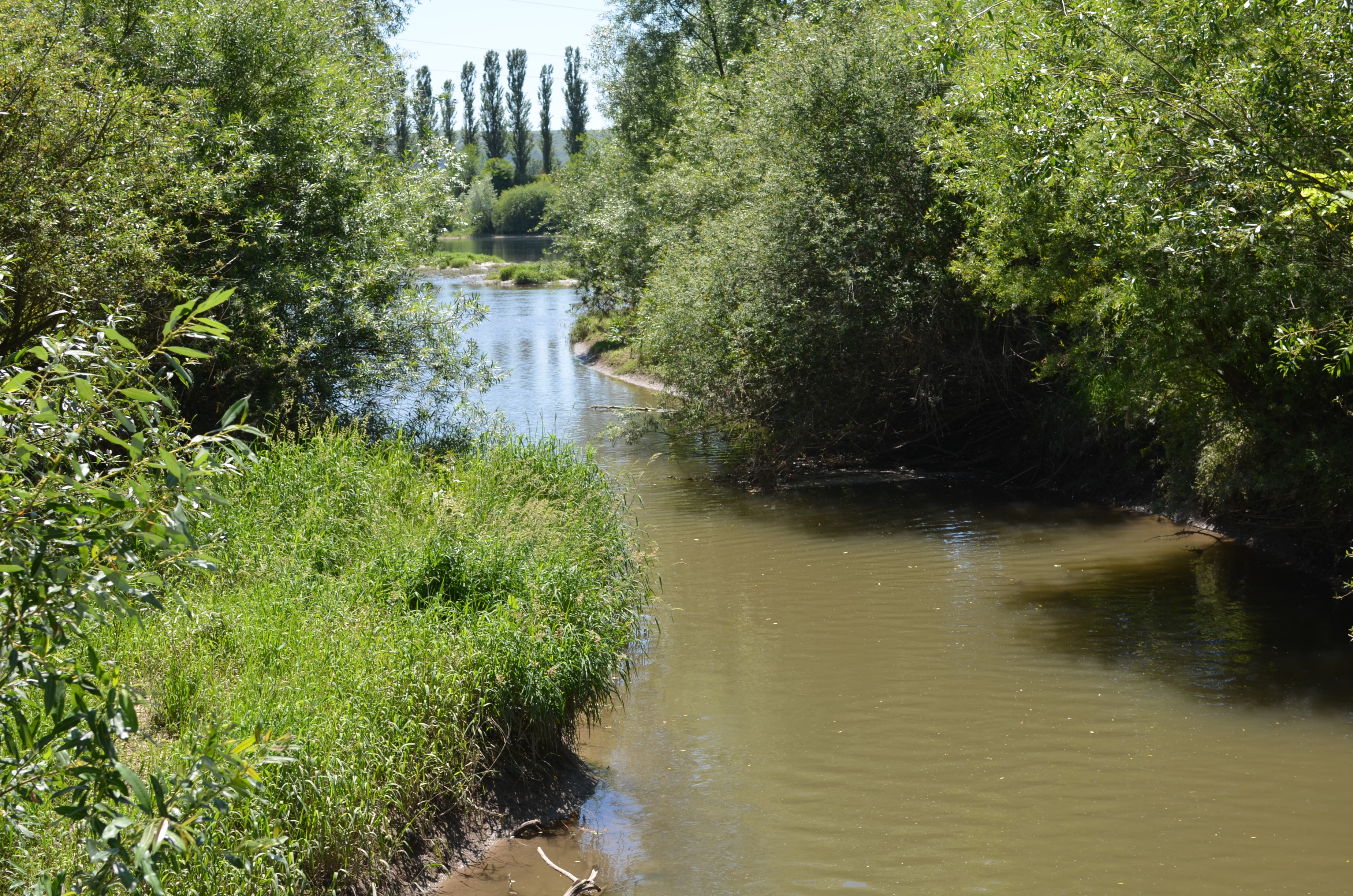 Річка Лядова у місці впадіння в Дністер